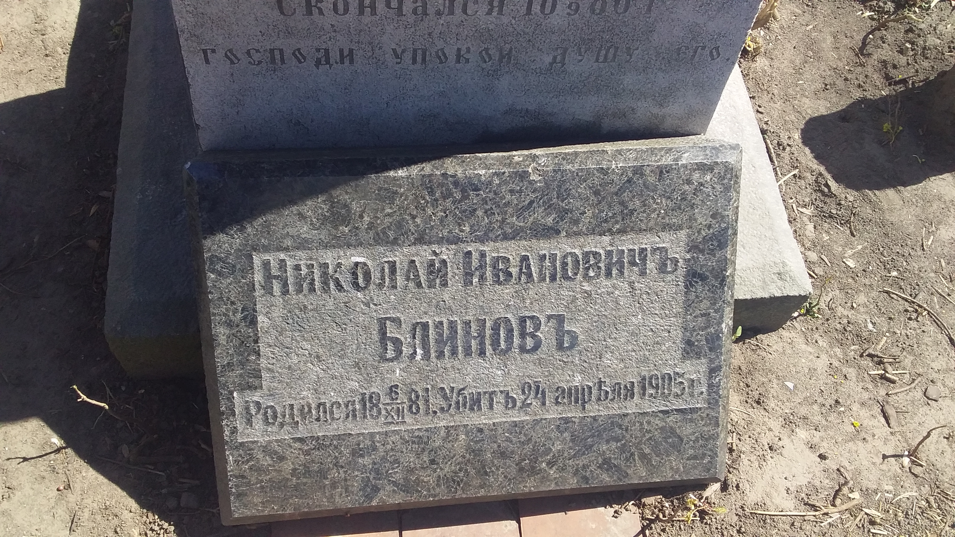 Могила Миколи Блінова, студента, що намагагався зупинити єврейський погром. Вільське кладовище, Житомир.